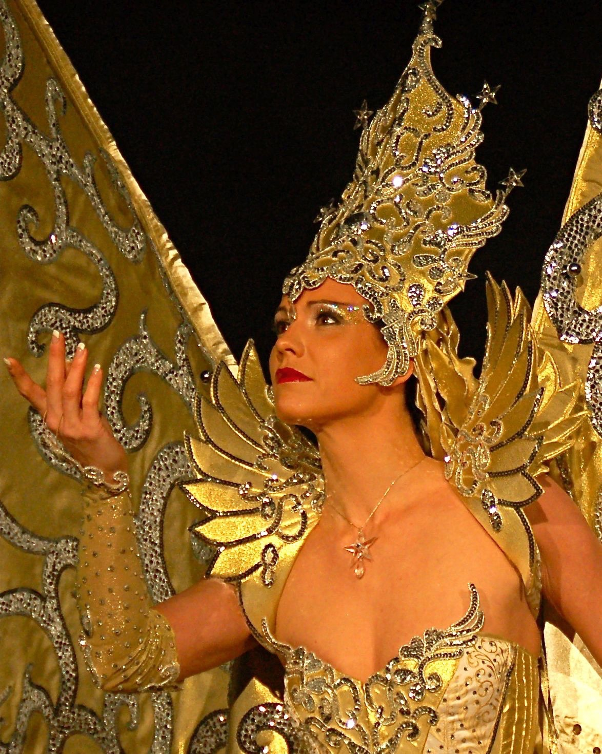 Sopranistin Christine Gogolin als "Angelo d'oro"